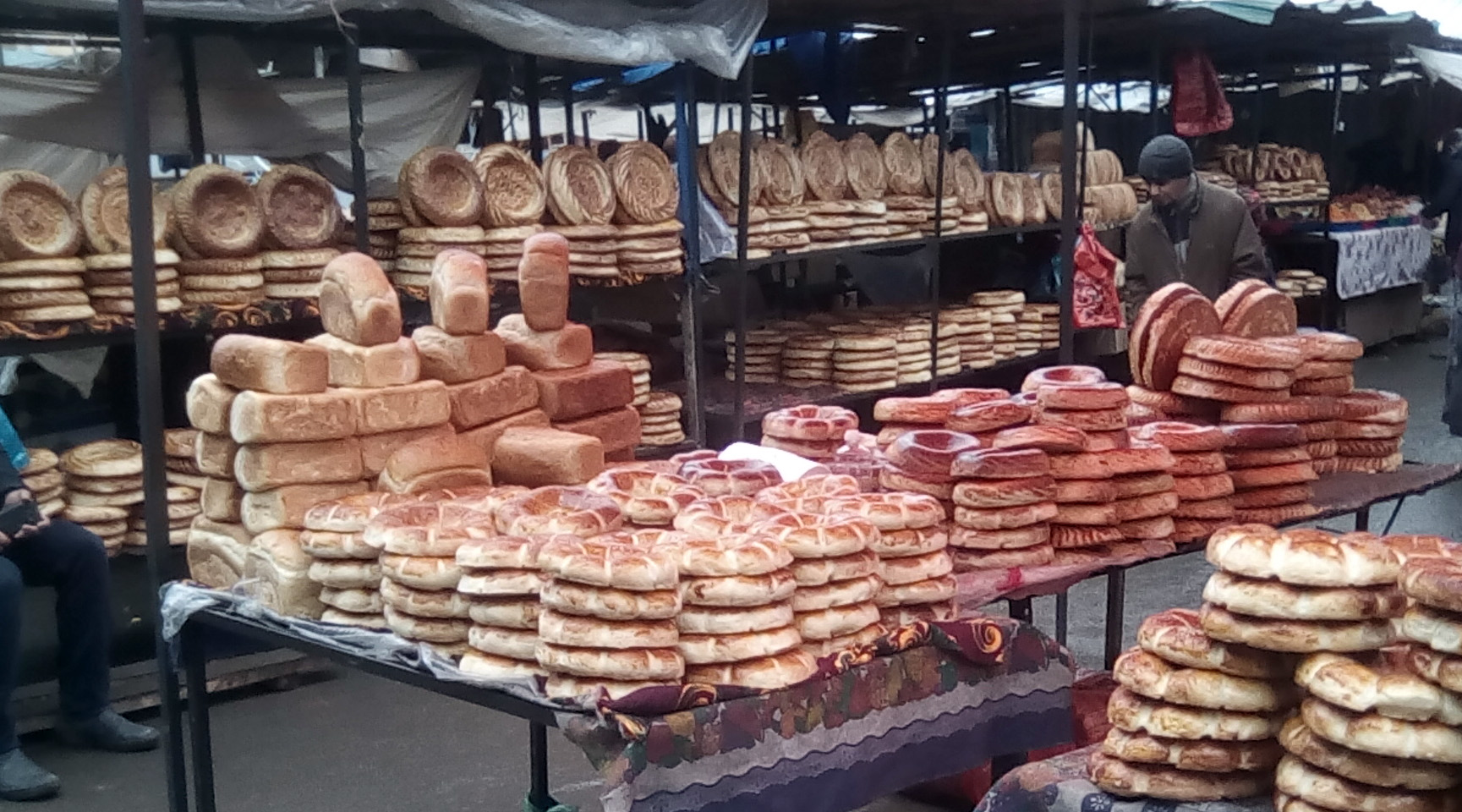 Лепёшки и буханки хлеба в хлебном ряду на ошском рынке